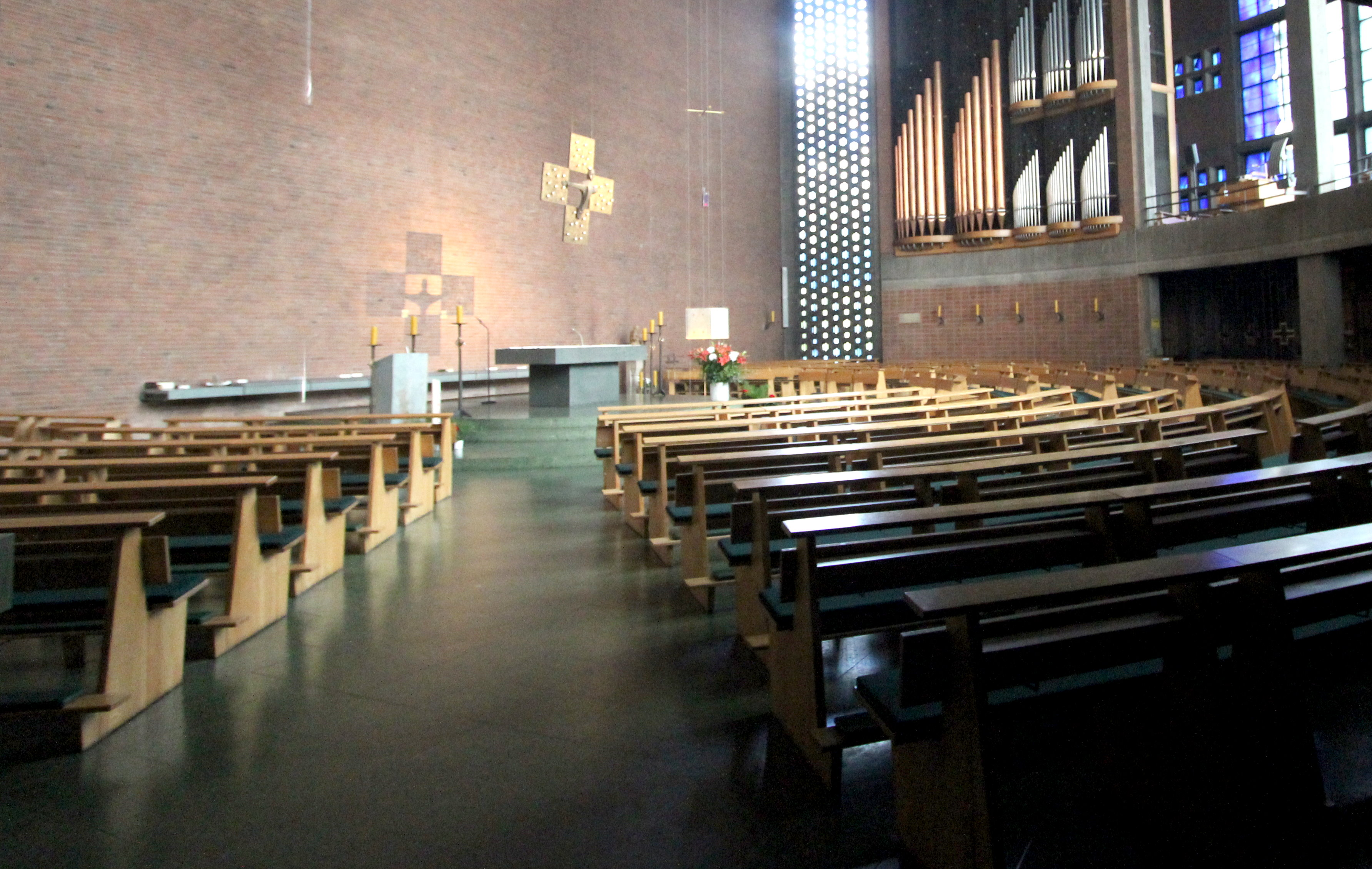 40468 Düsseldorf-Stockum; Carl-Sonnenschein-Straße 37. Katholische Kirche "Heilige Familie" von dem Architekten Hans Schwippert. Innenaufnahme von 2016.